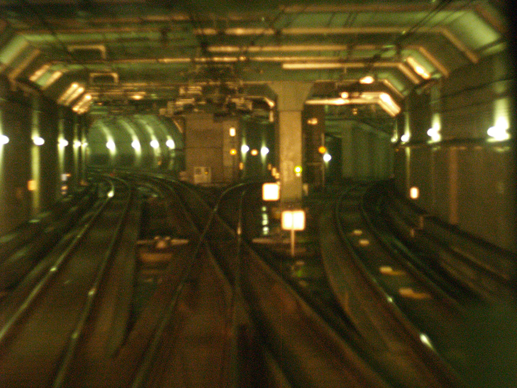 品川埠頭分岐部信号場。東京テレポート方から撮影。左側が東臨運輸区へ向かう引込線、右側が天王洲アイル・大崎方面。